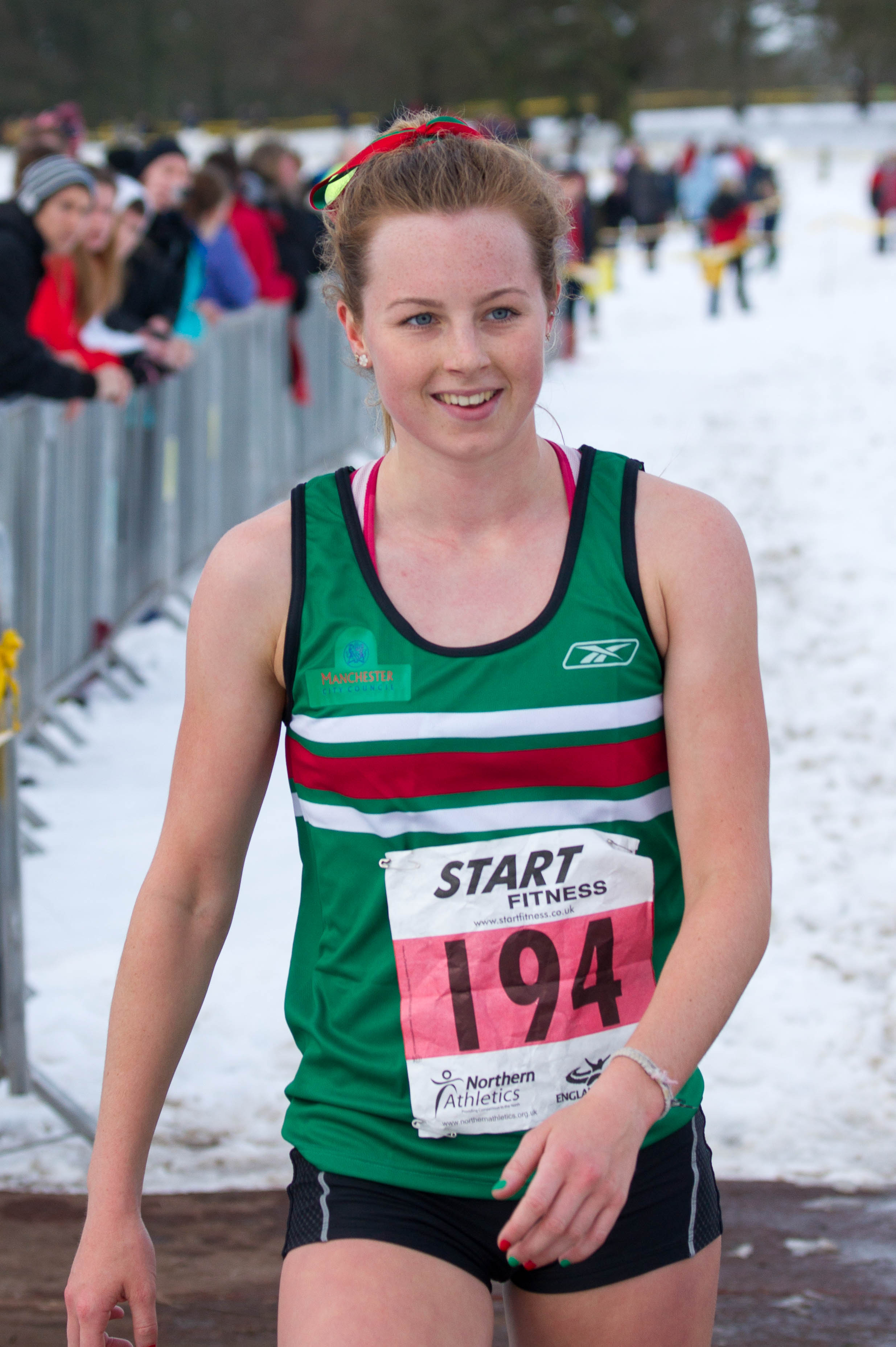 Georgia Taylor-Brown en 2013